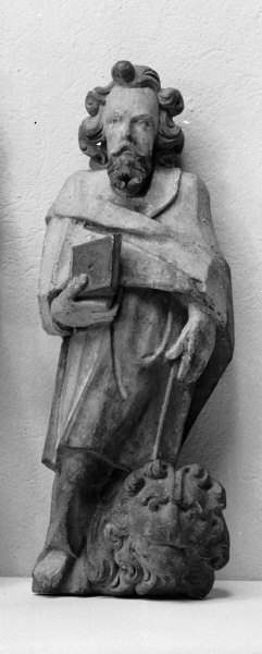 Skulptur av ek med polykromi, föreställande asposteln Markus. Kategori: (05) Skulpturer Skulptur av ek med polykromi, föreställande asposteln Markus.